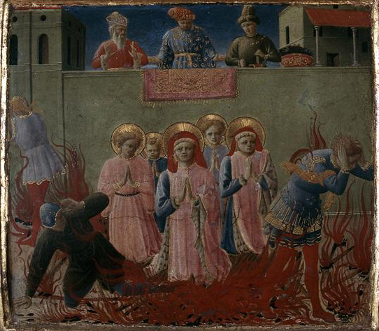 Angelico, San Cosma e San Damiano vanamente condannati al rogo